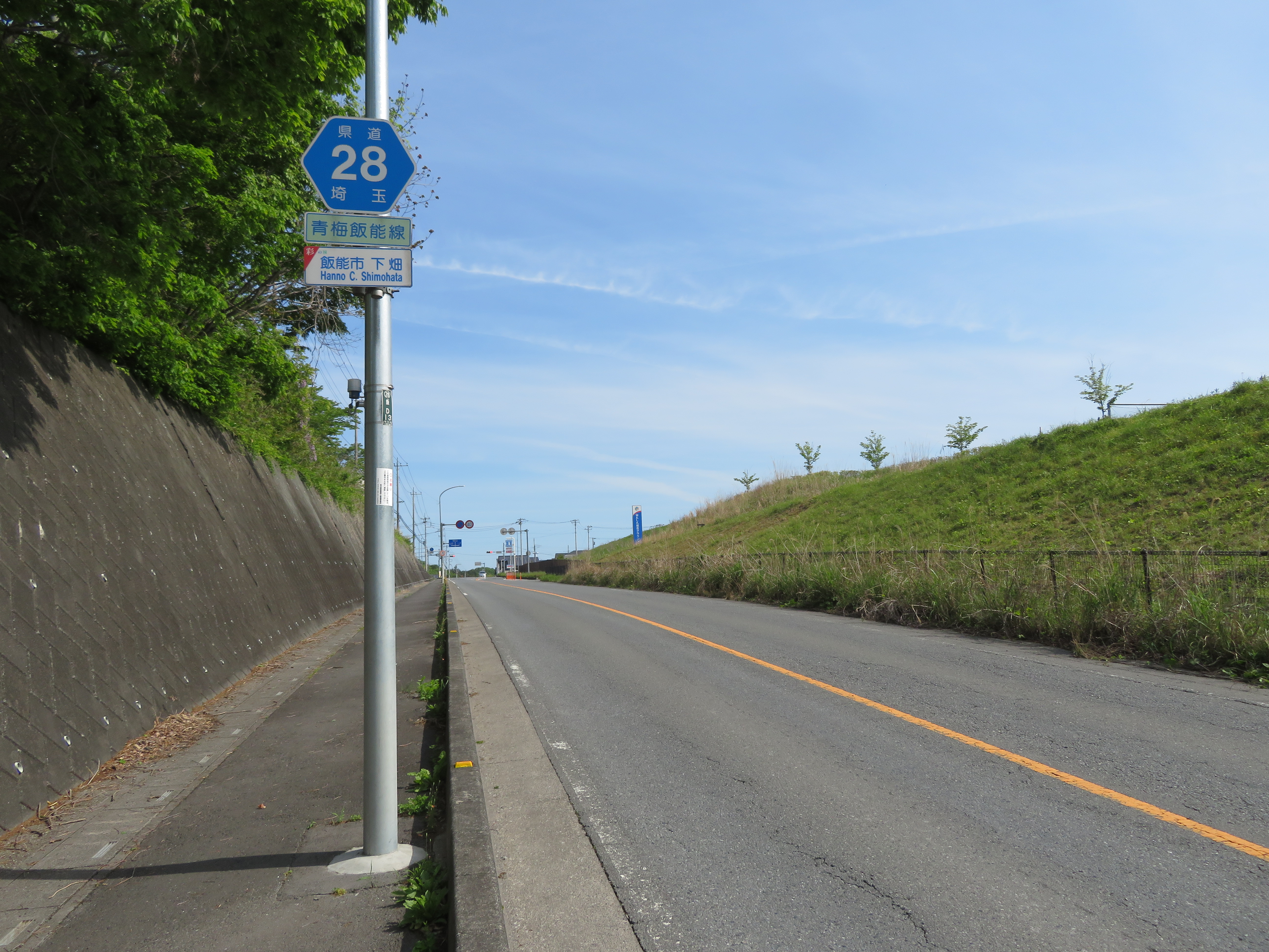 埼玉県道28号線飯能市下畑付近（飯能市市街地方面を撮影） Canon PowerShot SX720 HS